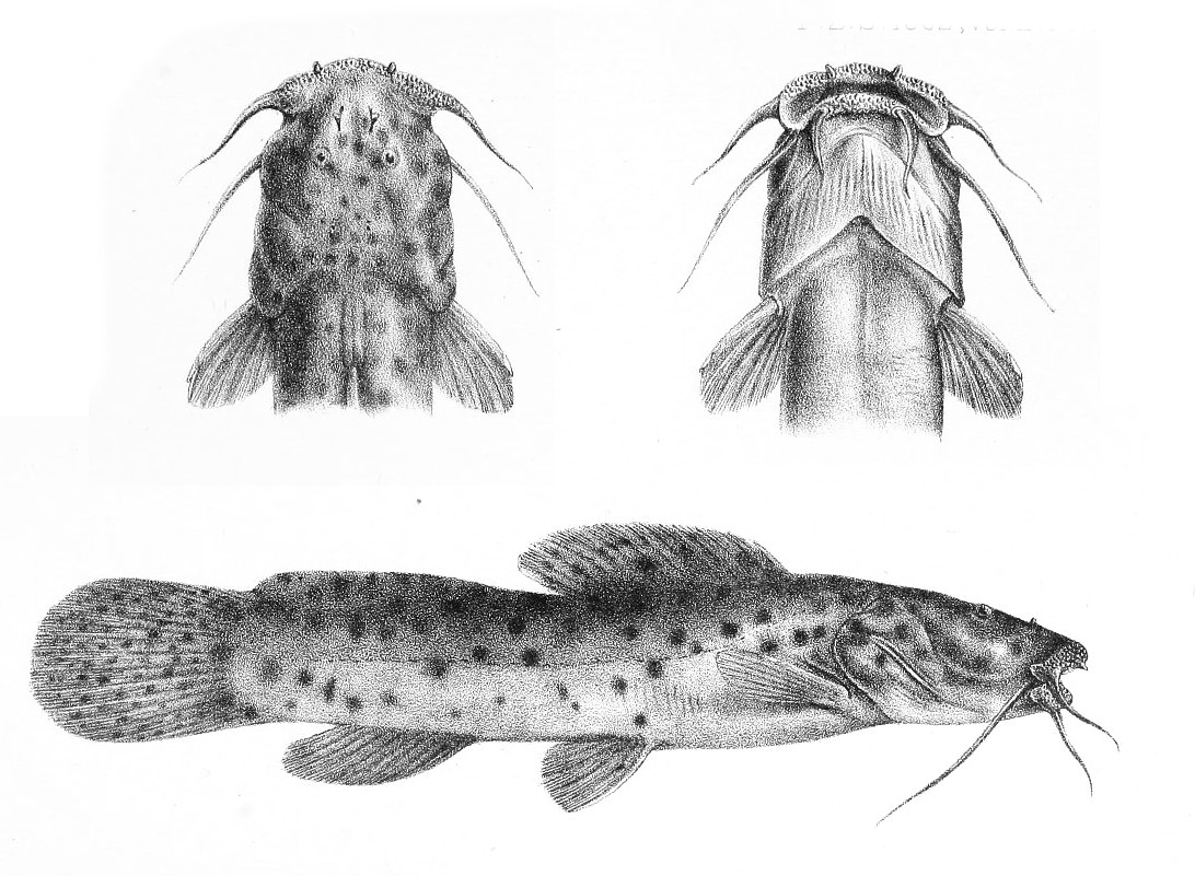 Notoglanidium walkeri